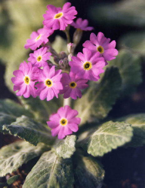 Primula fondosa var. columnae